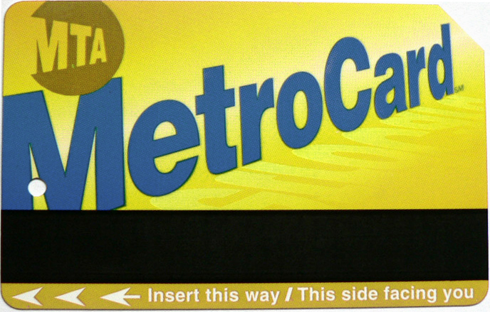 MTA MetroCard